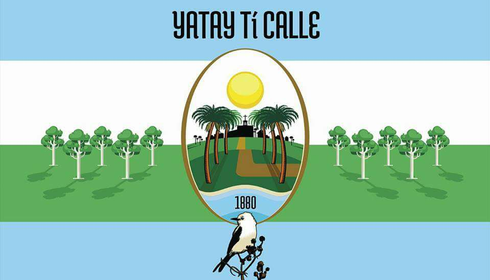 Bandera del Municipio de Yatay Tí Calle.jpg